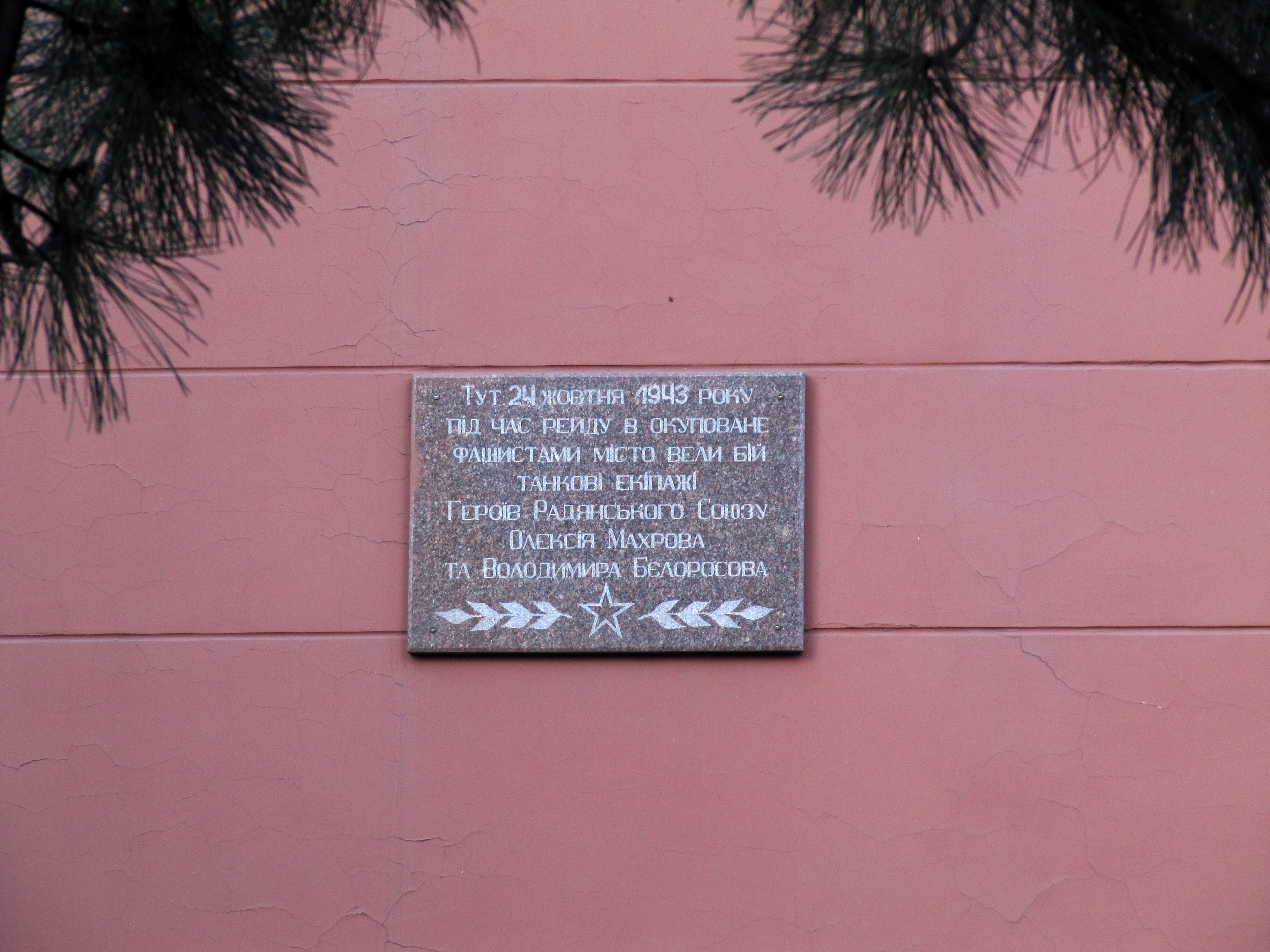 Гірничорудний інститут, головний корпус. Пам'ятна табличка